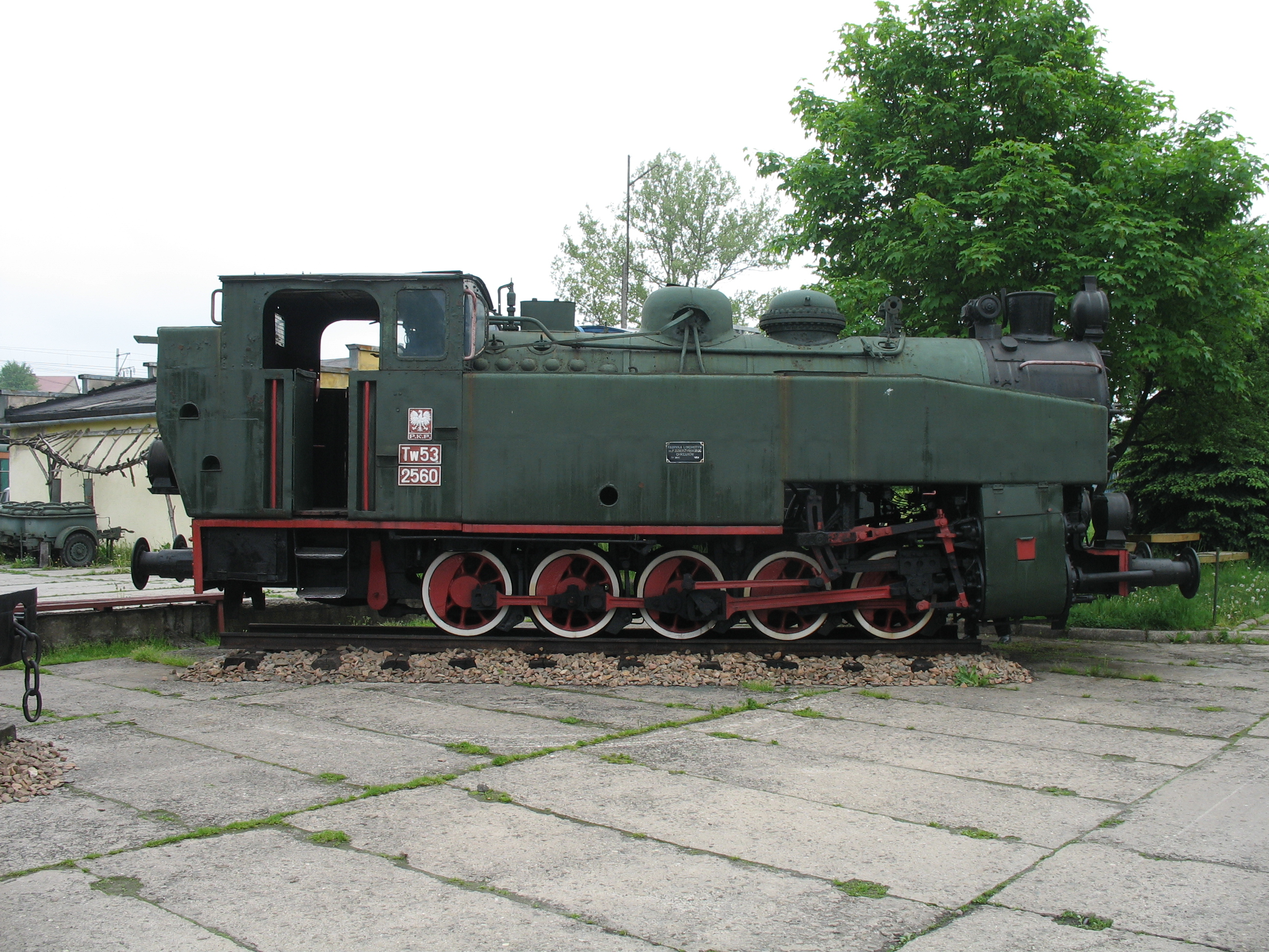 Wąskotorowa lokomotywa parowa Tw53-2561 (fałszywy numer 2560) wyprodukowana w 1954 roku w Fabryce Lokomotyw im. F.Dzierżyńskiego, numer seryjny 3990. Do 1988 pracowała na Górnośląskich Kolejach Wąskotorowych. Następnie była eksponowana w Bielsko-Białej, skąd w 2001 roku została przeniesiona do Skansenu w Chabówce.